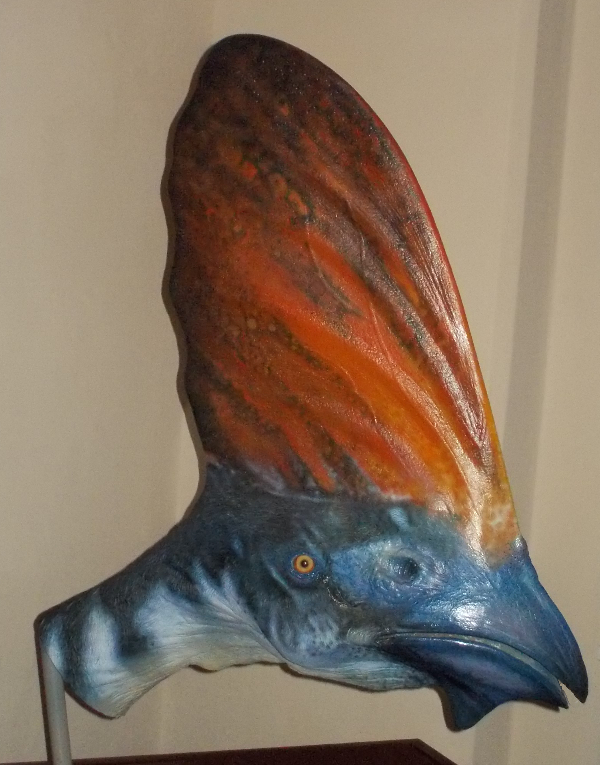 Ricostruzione museale capo di Tapejaridae